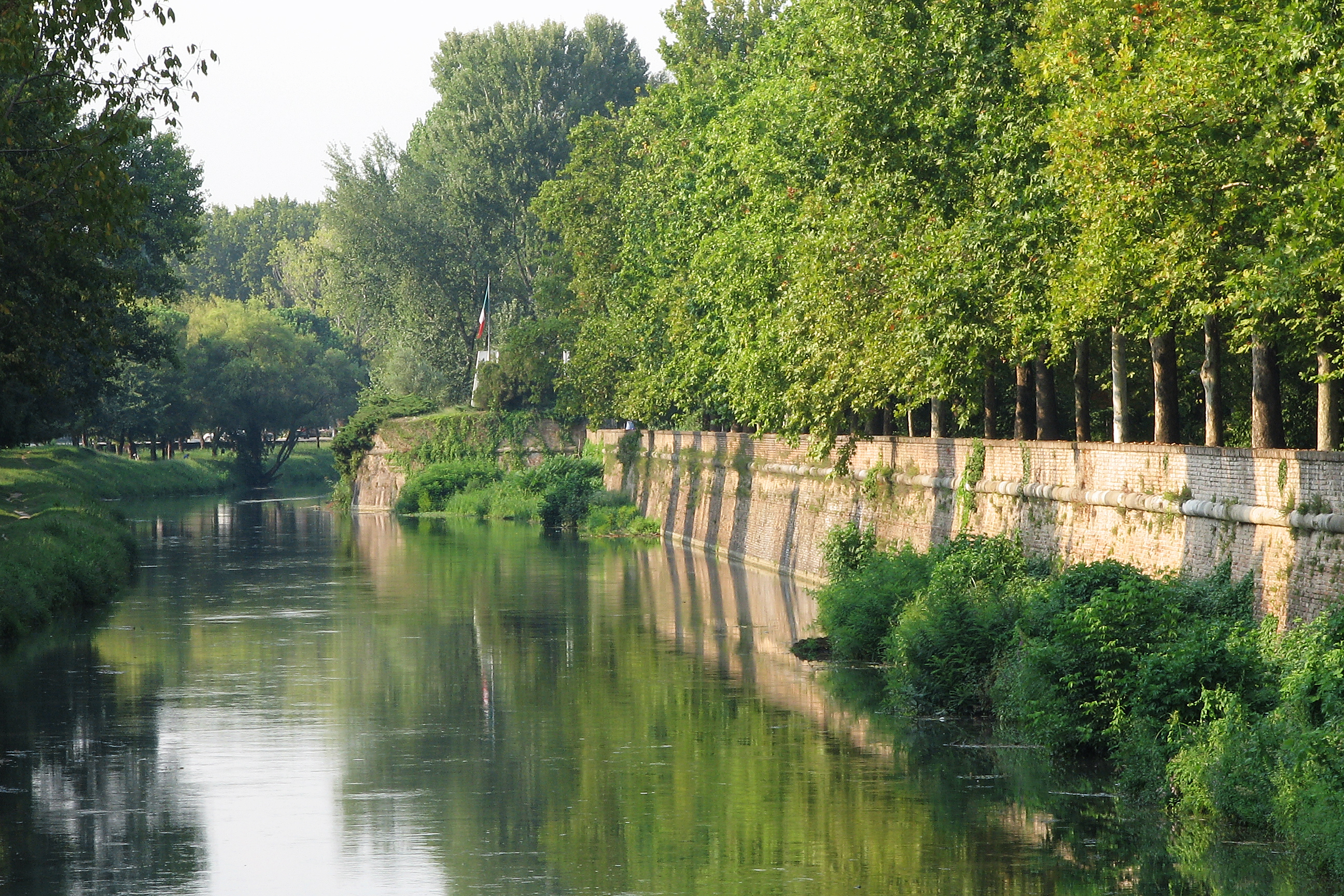 Vista delle mura cinquecentesce di Padova lambite dal Tronco Maestro del fiume Bacchiglione. Sullo sfondo il Torrione Ghirlanda, del 1523, sulla cui piattaforma sorge oggi il monumento ai caduti nella campagna di Russia.